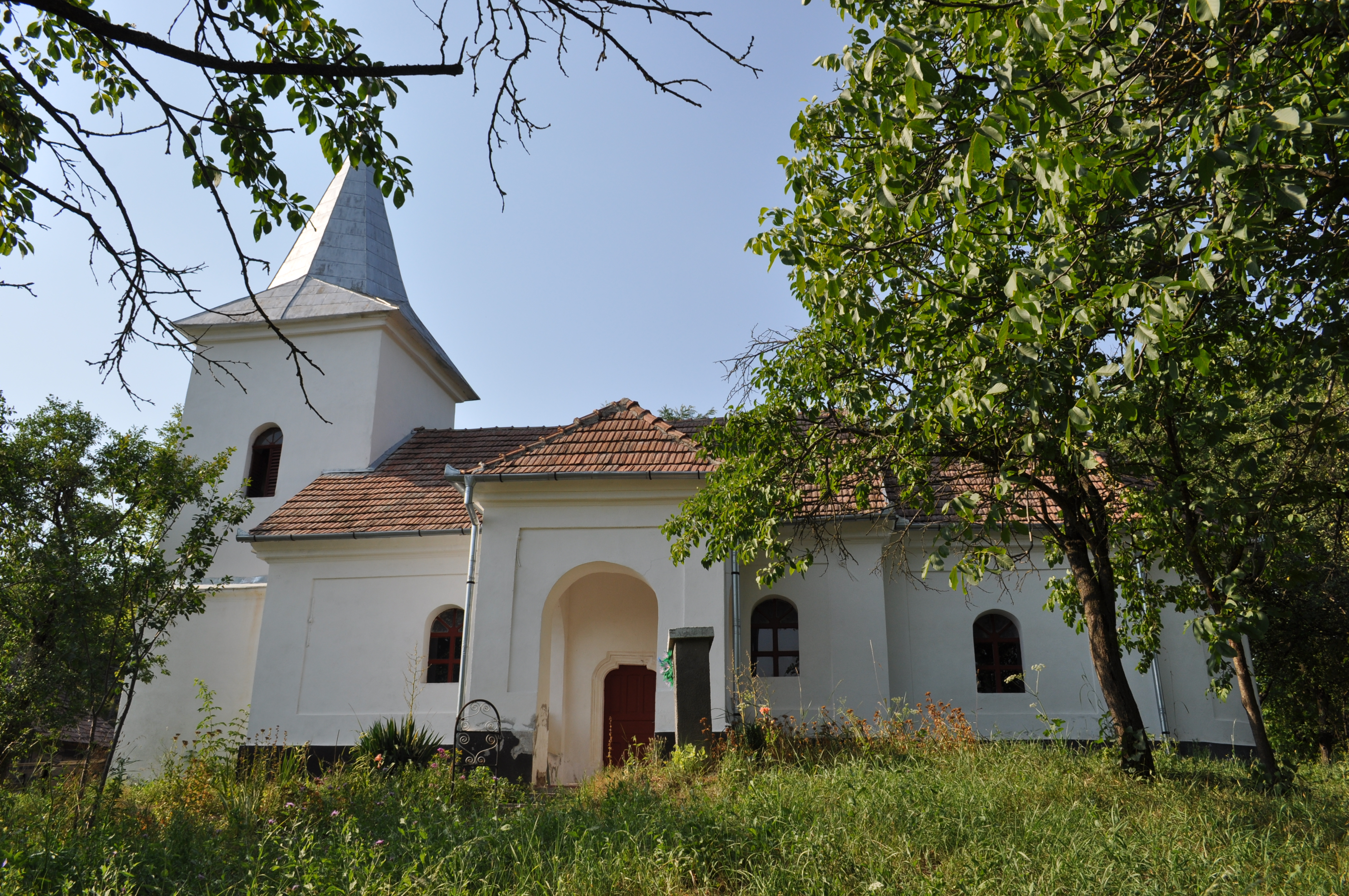 Biserica reformată, sat COMLOD; comuna MILAŞ